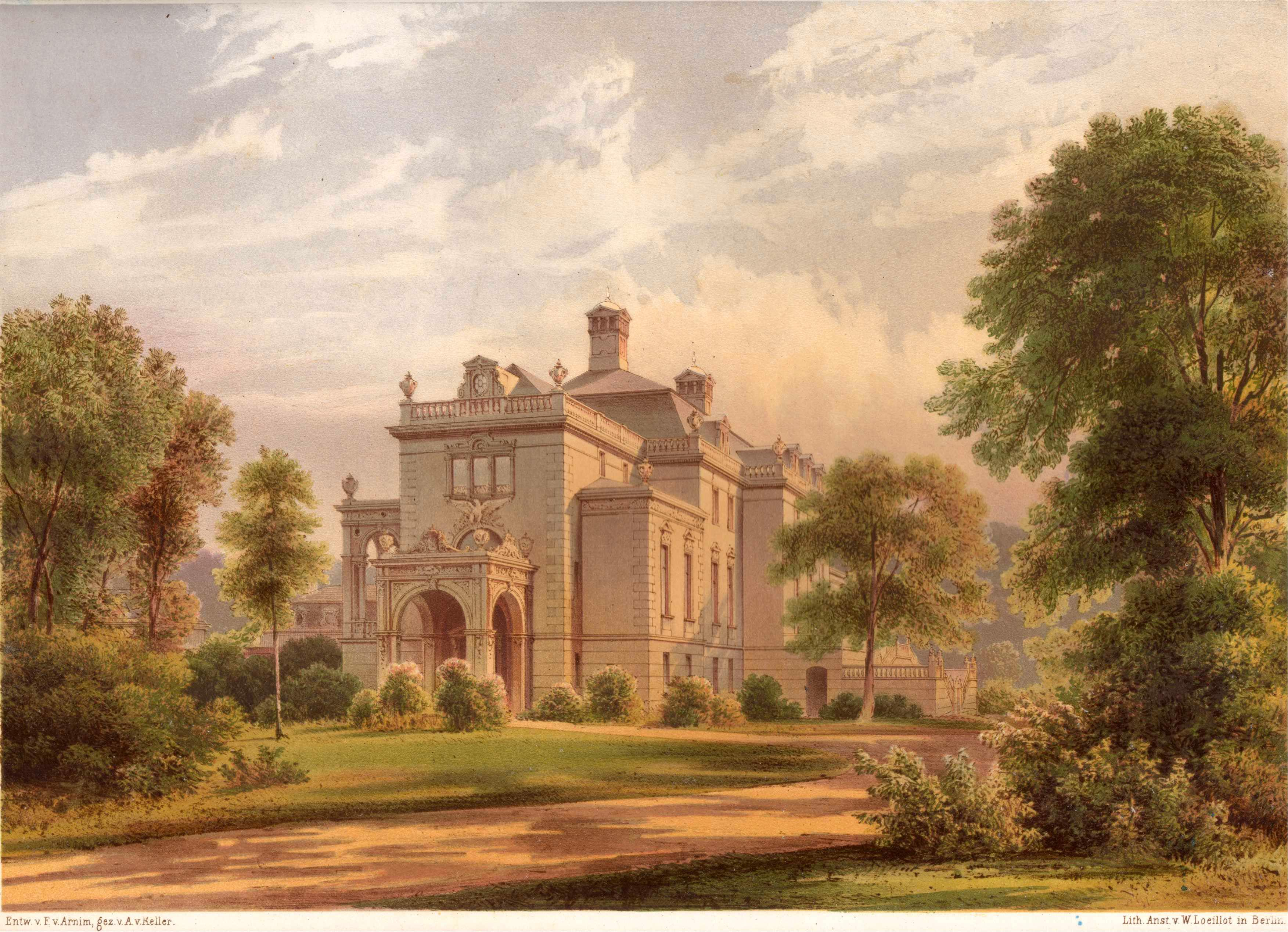 Berlin, Jagdschloss Glienicke, Treppenhaus